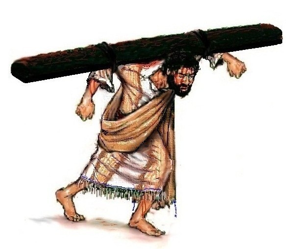 Costumbre romana de hacer transportar a un reo un yugo o patíbulo, hasta el lugar de la ejecución.